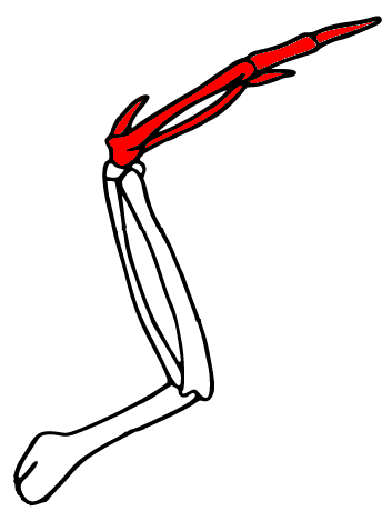 Main chez les oiseaux en rouge.